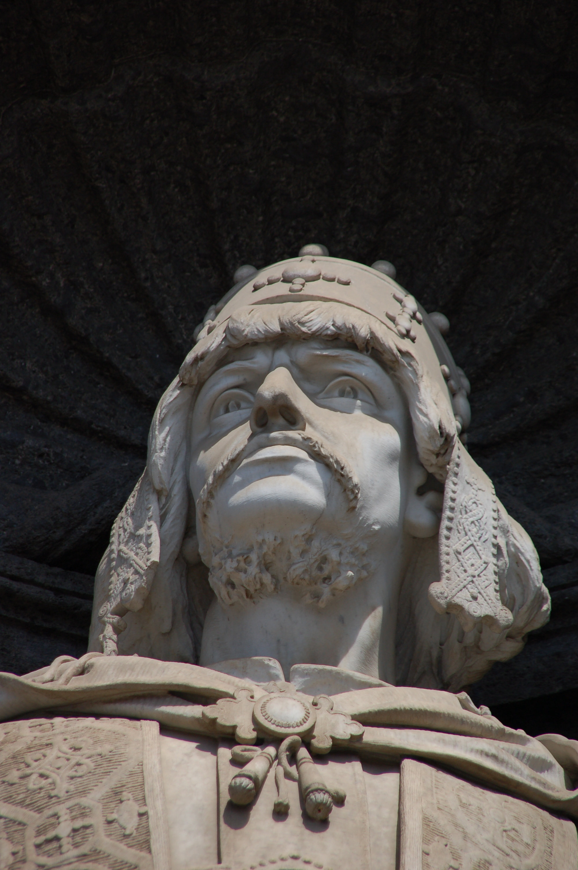 Statua sulla facciata del Palazzo Reale di Napoli: Ruggero il Normanno, Ruggero II d'Altavilla - Hauteville (Ruggero II di Sicilia), re di Napoli.